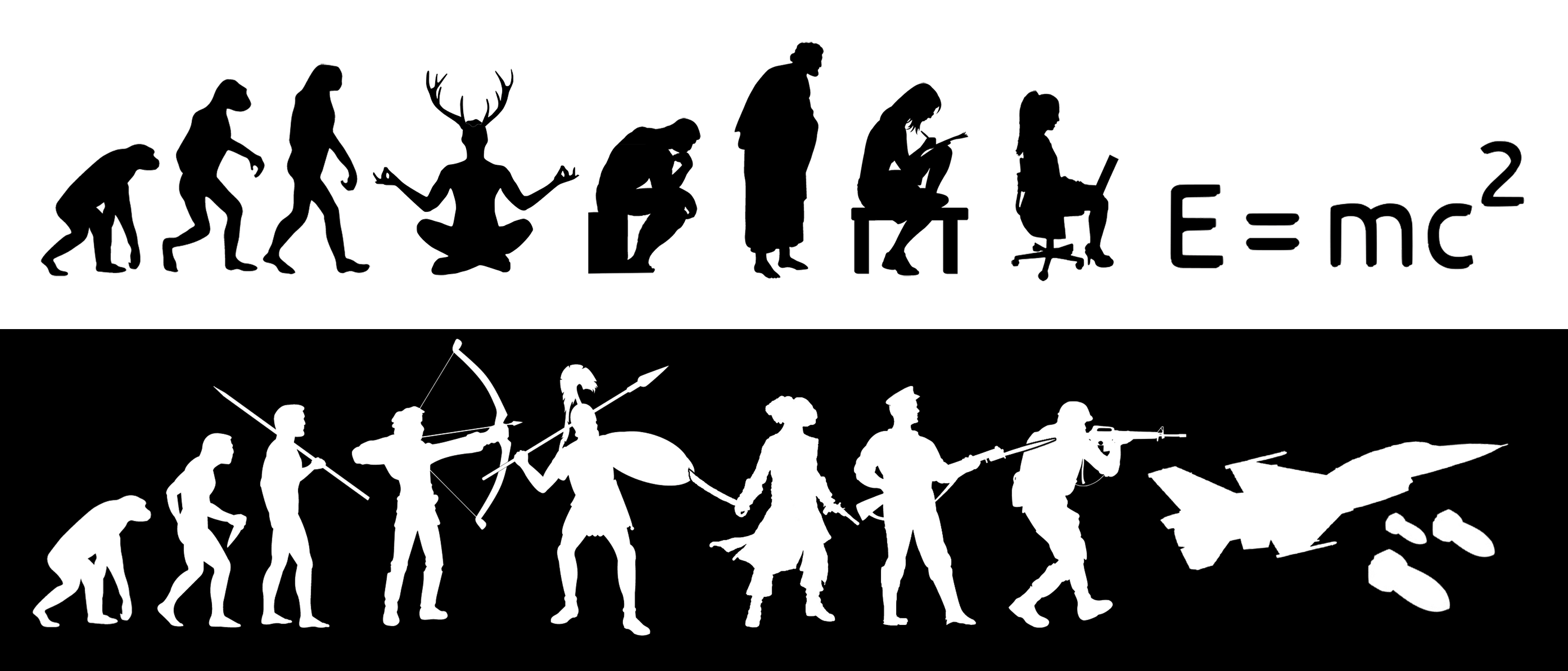 Collage: Die beiden Seiten des Fortschritts, eine Frage der Sichtweise